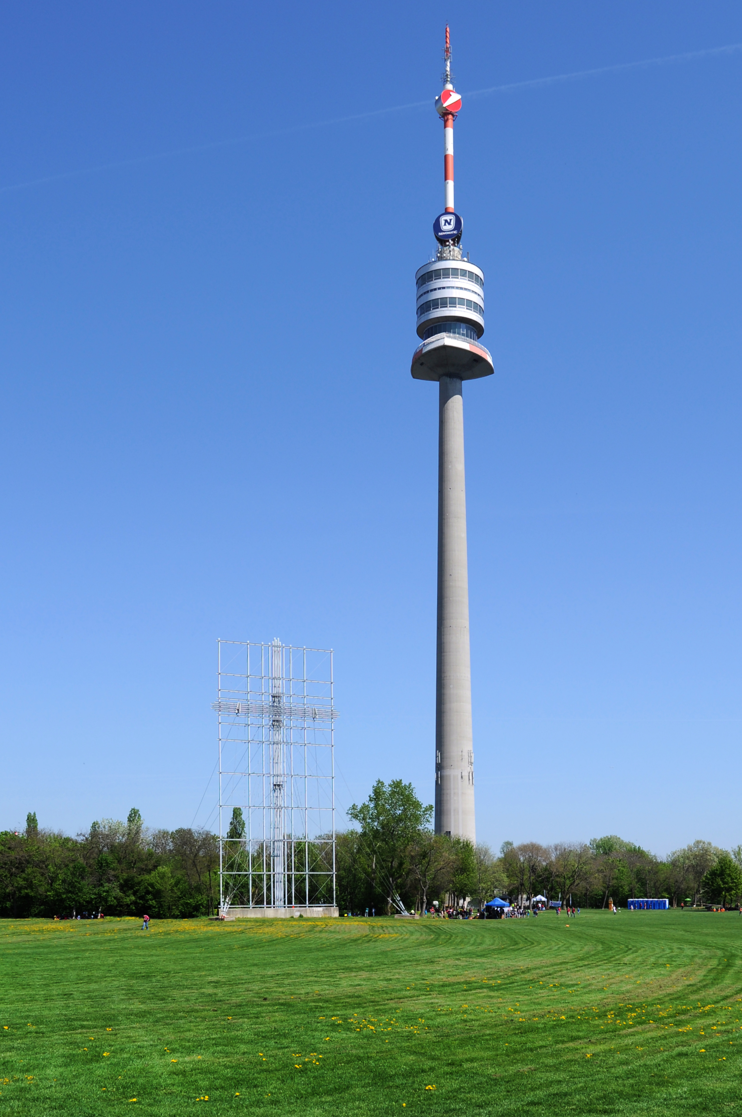 Papstkreuz und Donauturm von der Papstwiese aus gesehen